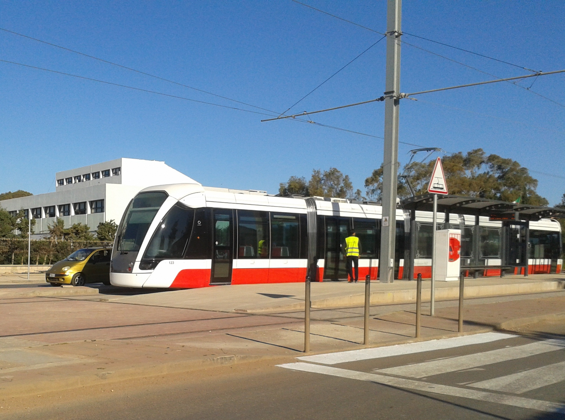 Tramway d'Oran devant l'ENPO (ex. ENSET Oran)